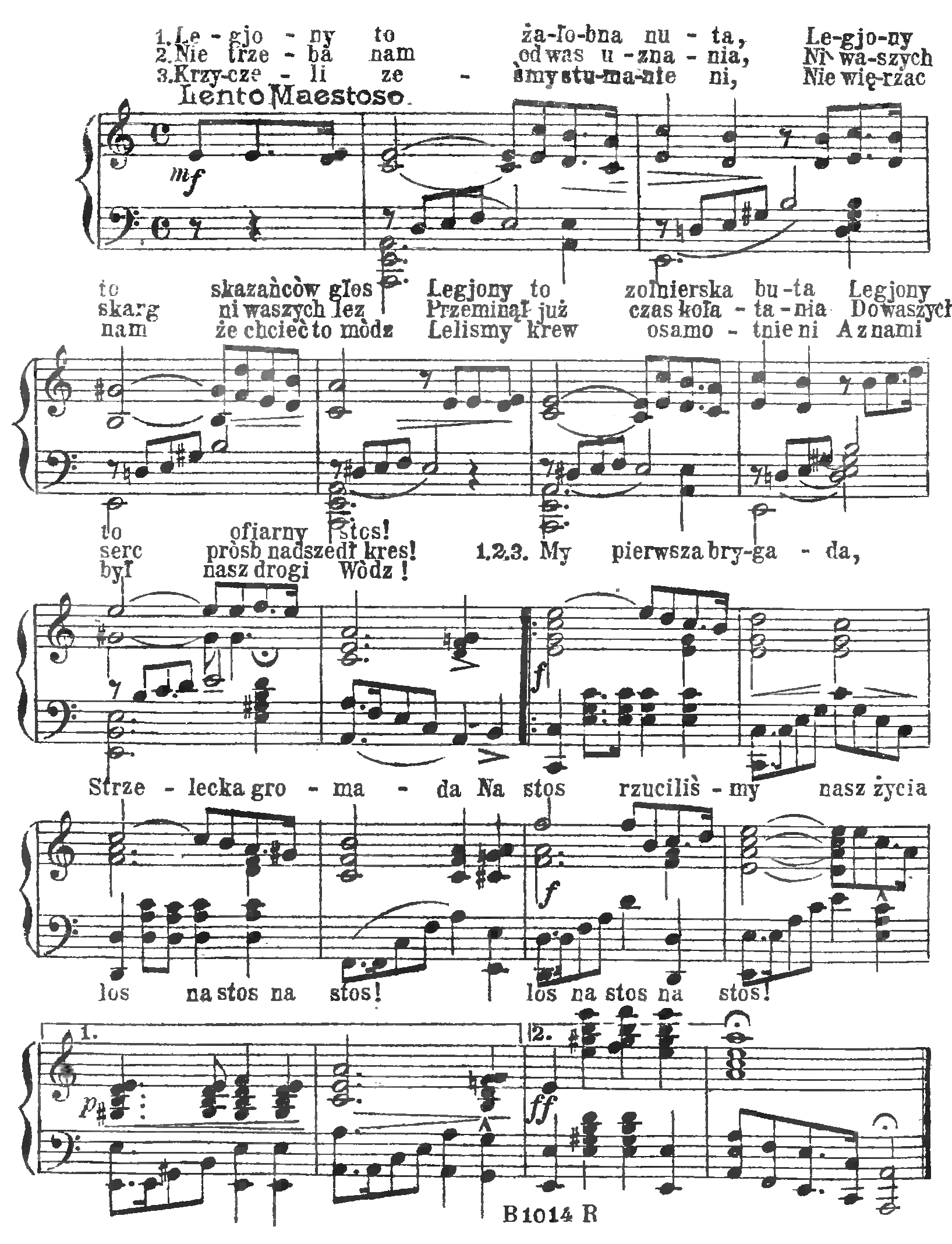 skan broszury PL publikacja B. Rudzki ; Druk. i Lit. p. f. "Jan Coty" Warszawa ca 1920